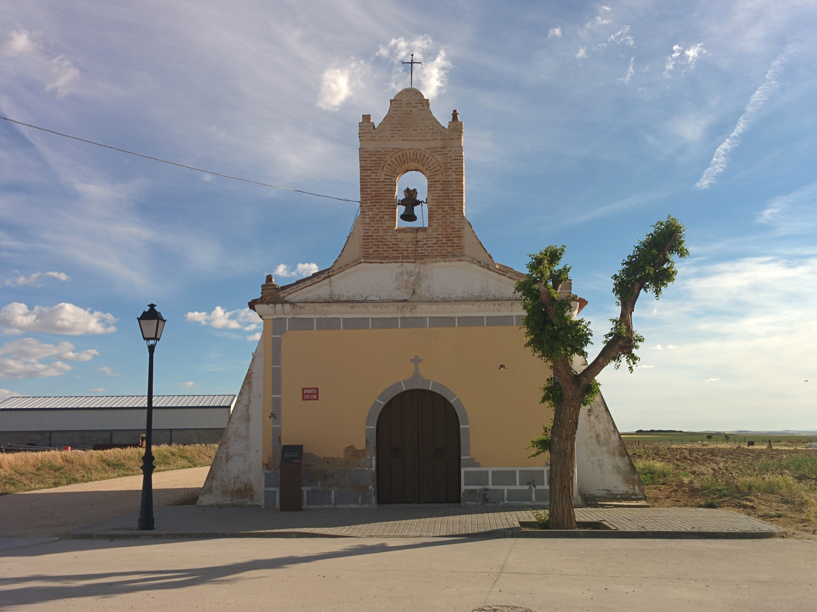 Ermita del Cristo de los Remedios, en Sinlabajos (Ávila, España).